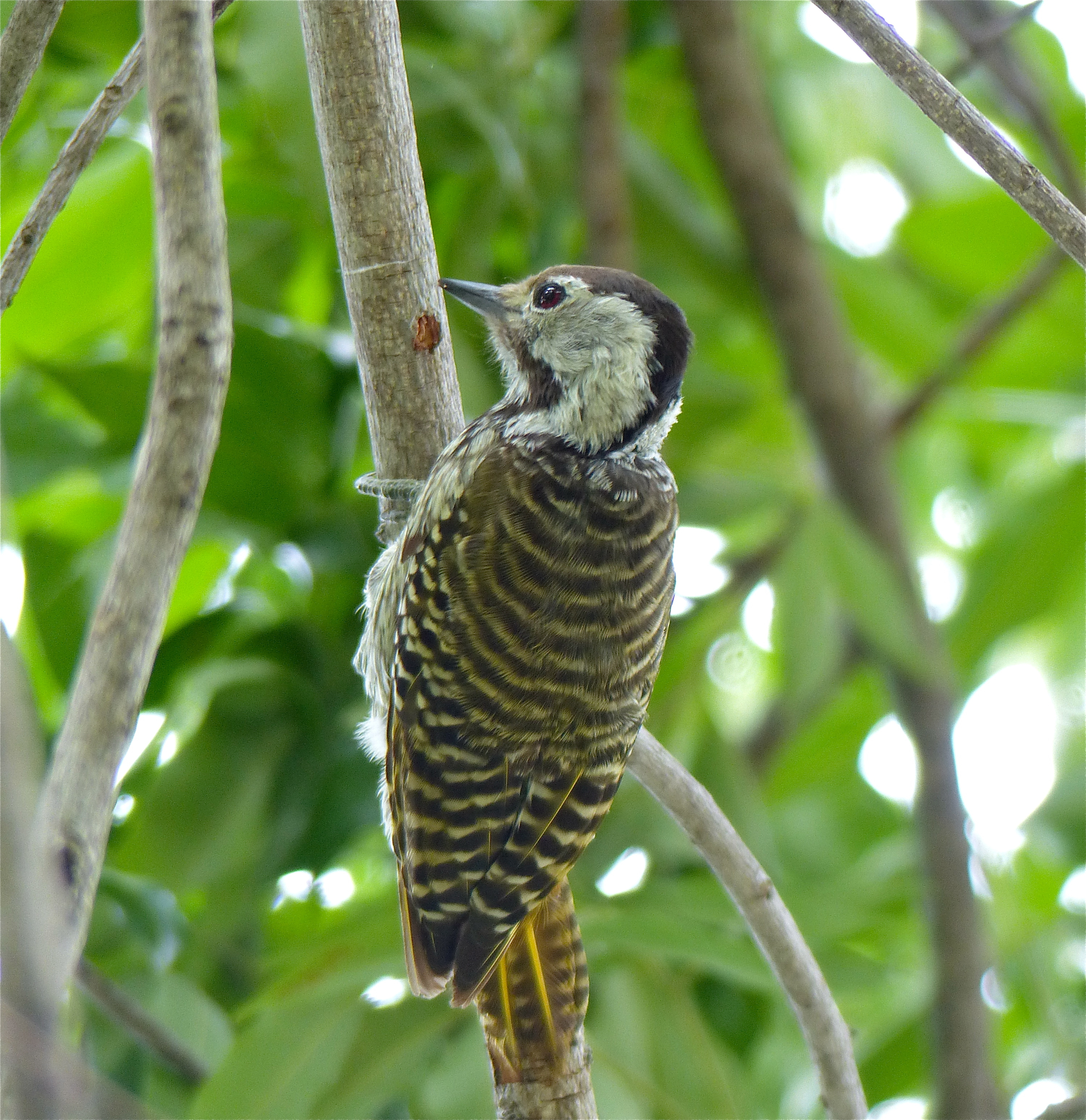 Skukuza Camp, Kruger NP, SOUTH AFRICA